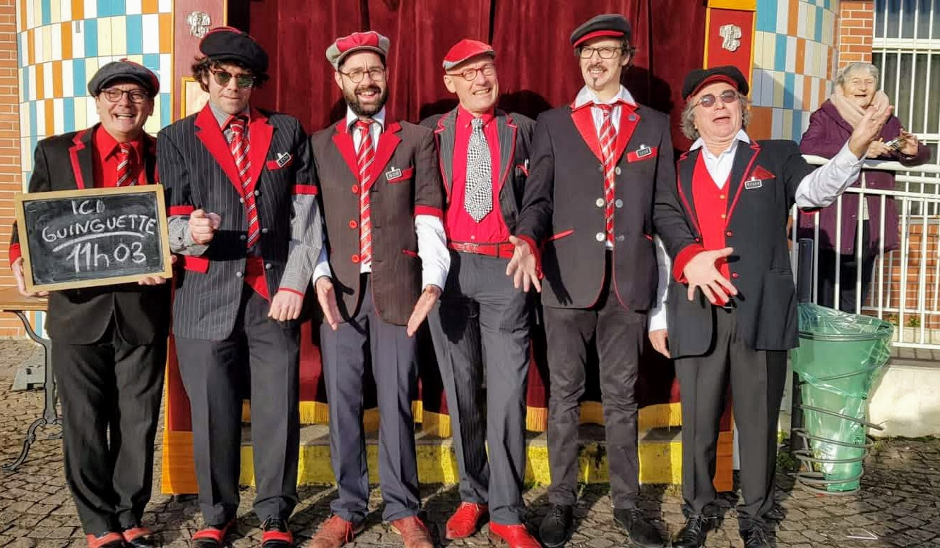 Photo prise en janvier 2020 à la Guinguette "Au Trois Francs Six Sous" de Pierrefitte-sur-Seine